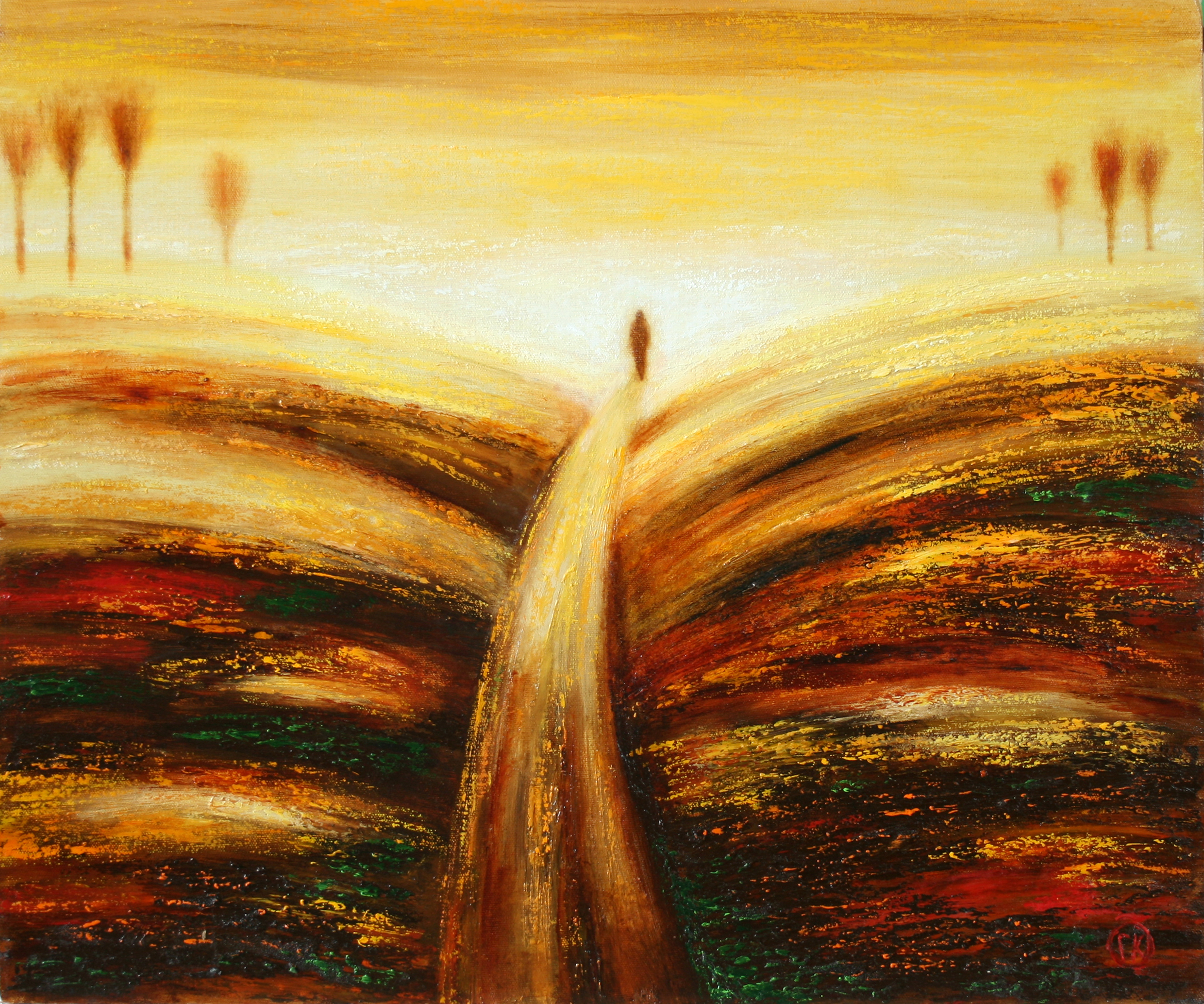 Картина Галины Каковкиной "Дорога за холмы",холст/масло, 50*60см Painting by Galina Kakovkina "Road across the hills", oil on canvas, 50x60